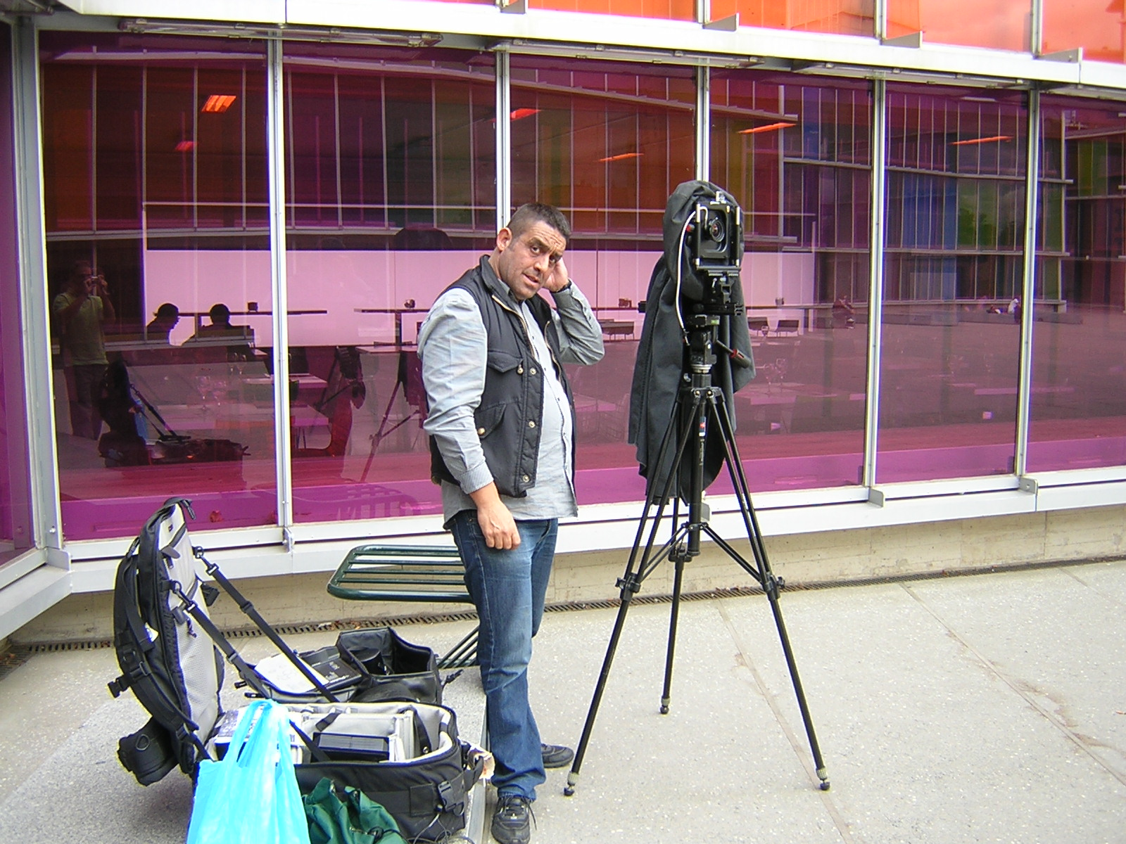 José Ignacio Martínez Suárez. Fotógrafo